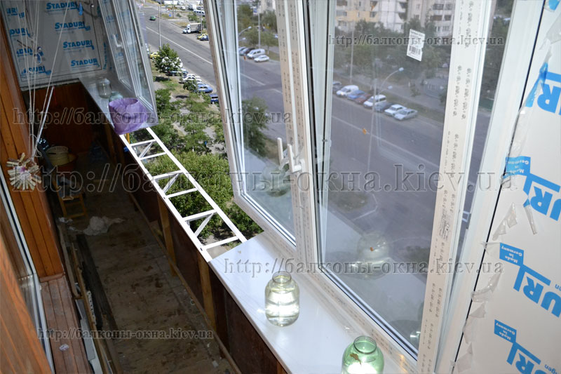 Винос балкону по підвіконню